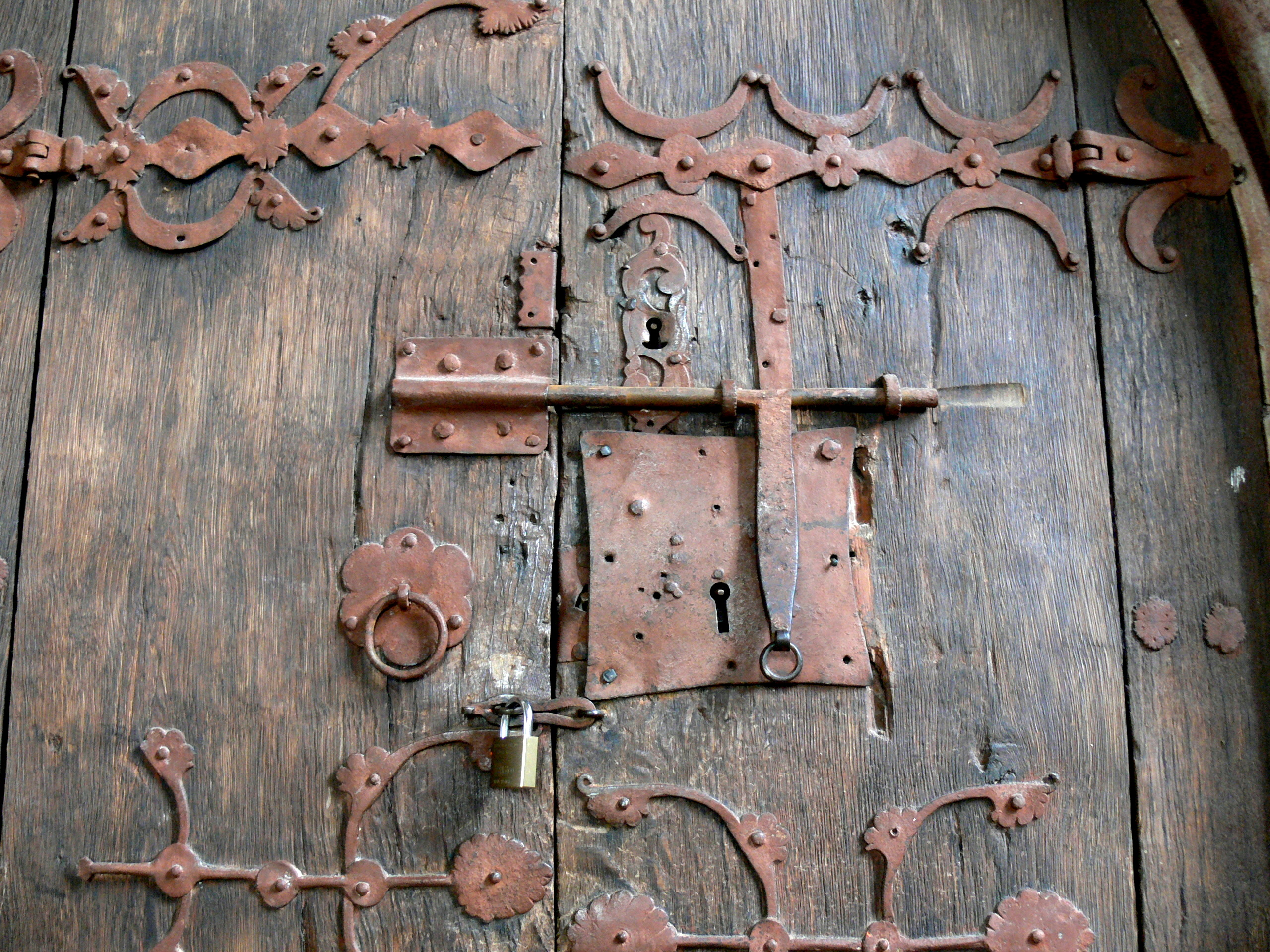 Lällunge kyrka auf Gotland. Gotische Sakramentsnische - Türbeschläge und Schloss